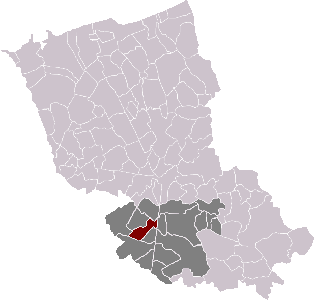 Locatie gemeente Linde in arrondissement Duinkerke. Zelfgemaakt. Location of Lynde municipality in the arrondissement of Dunkirk. Self made. Localisation de la commune de Lynde dans l'arrondissement de Dunkerque. Fait moi-même.